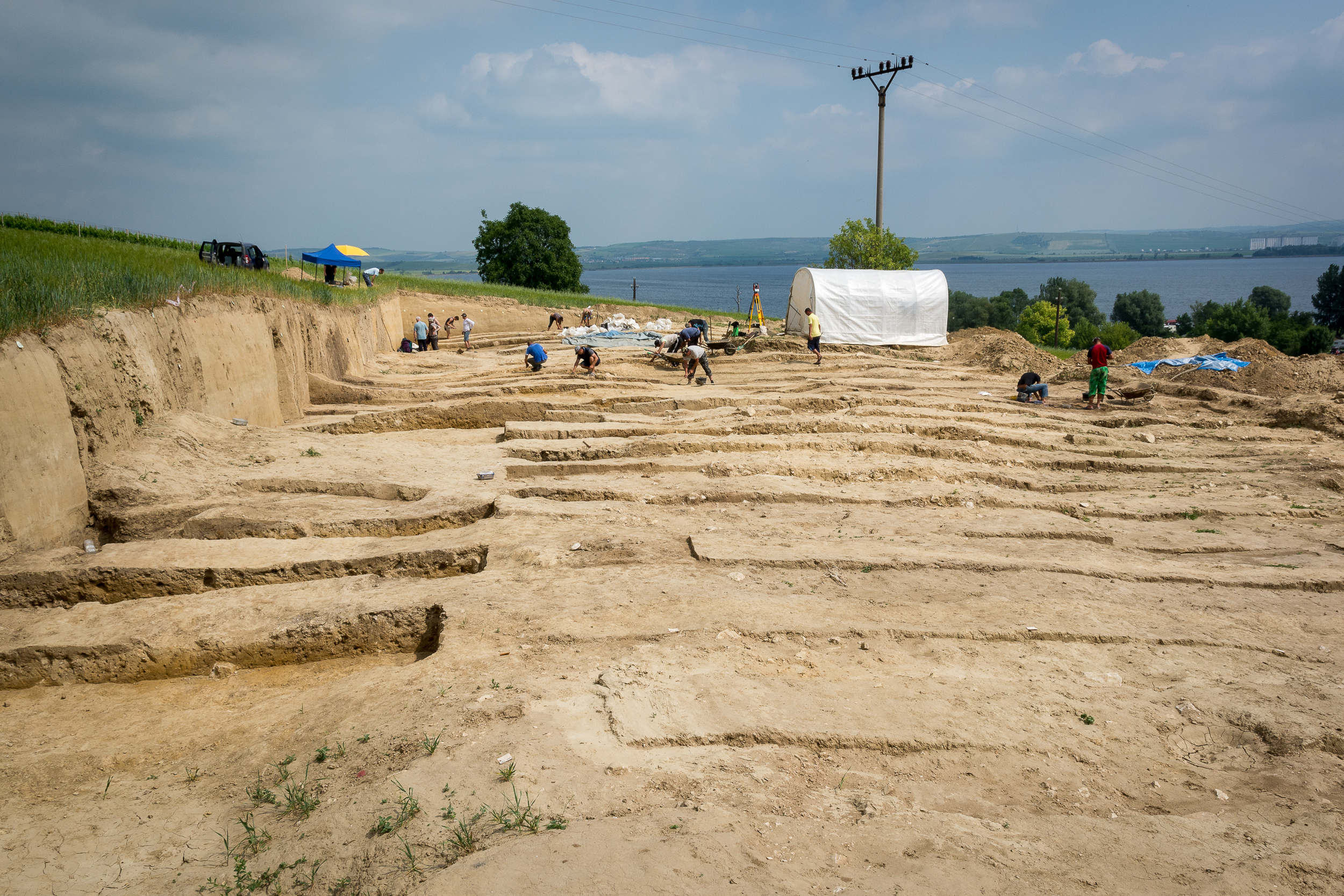 Ausgrabungen an der paläolithischen Station Pavlov I in Tschechien, Grabung Svoboda 2014.